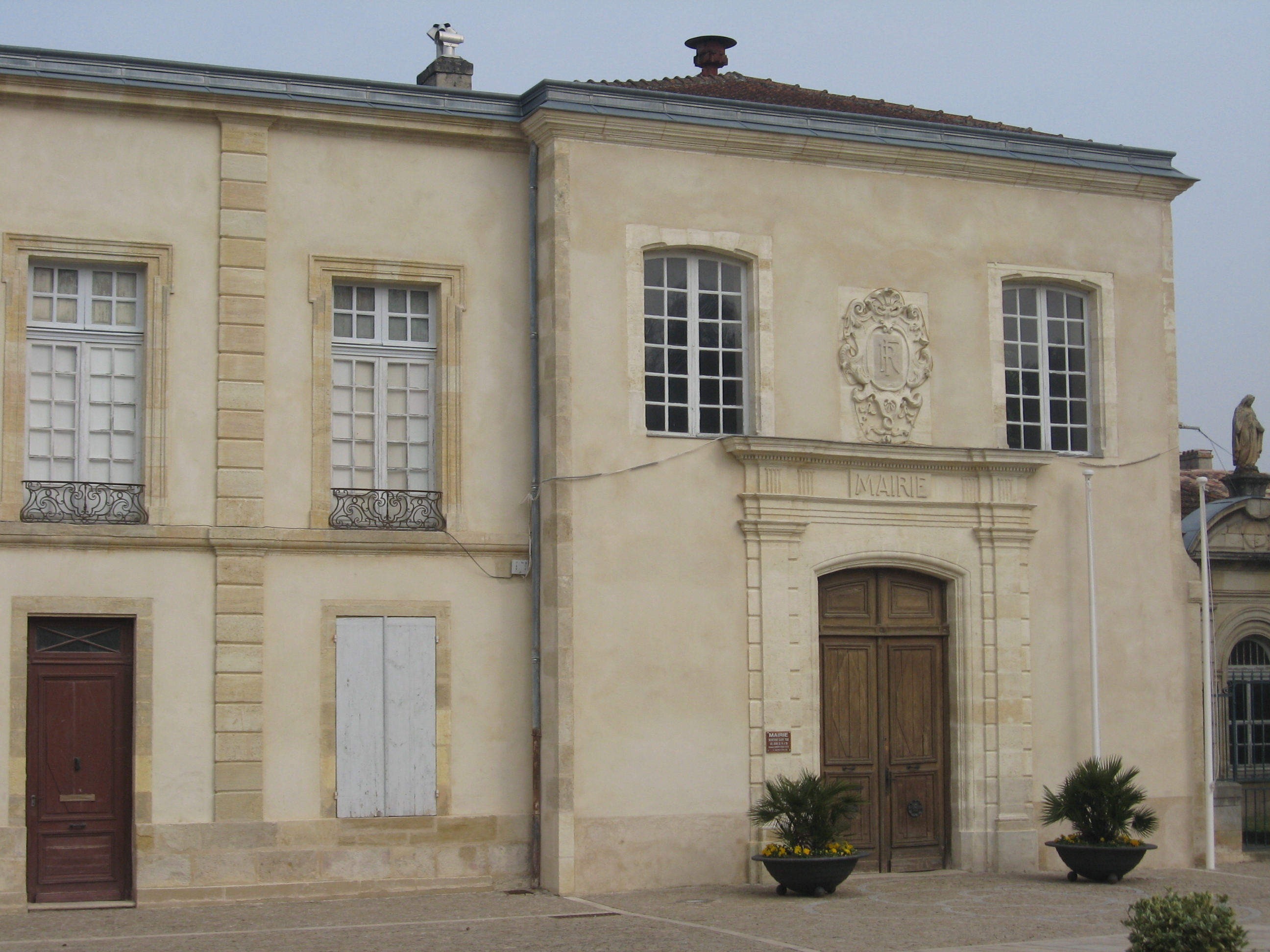 Façade de la mairie de Verdelais